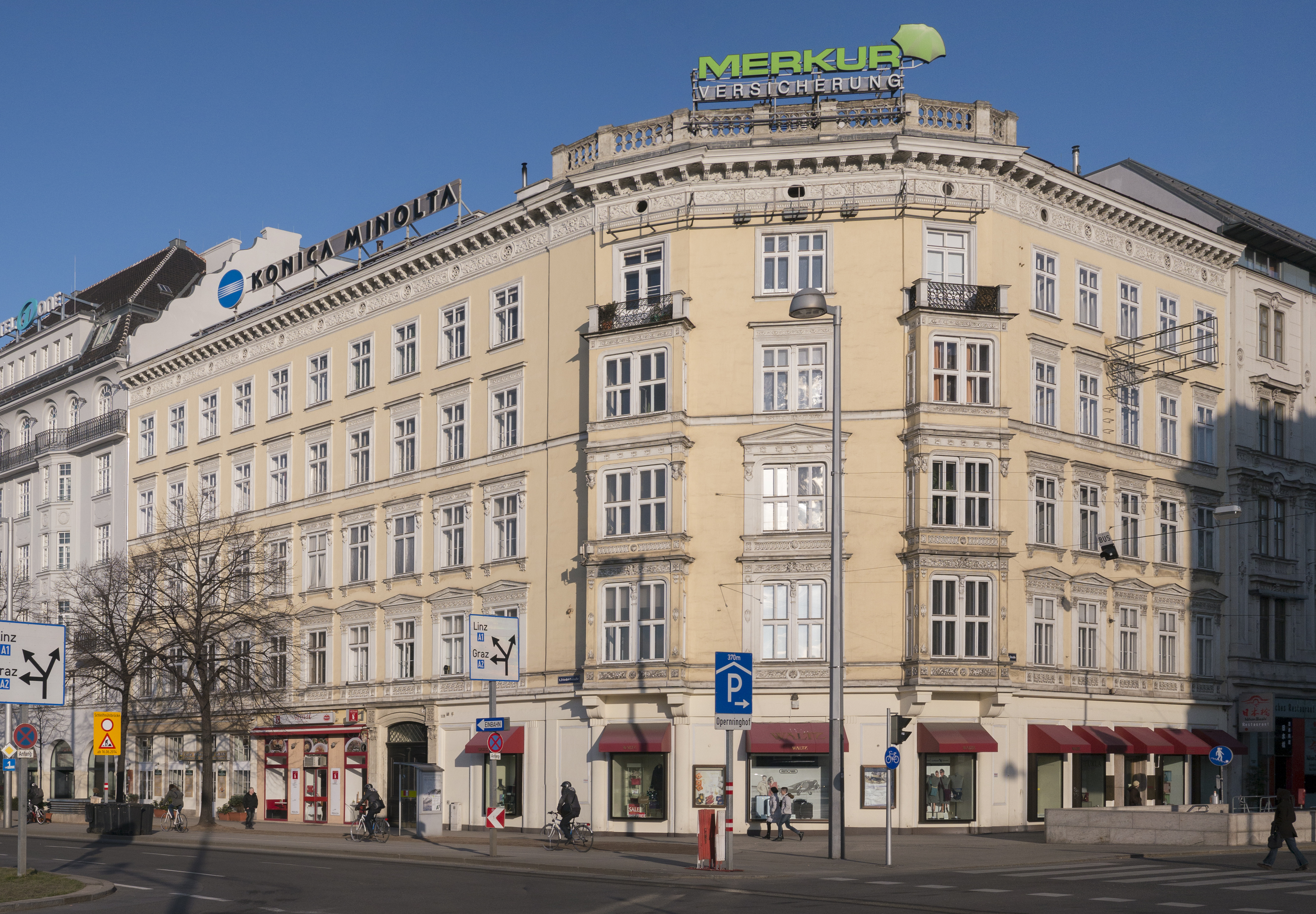 Miethaus Friedrichstraße 2, Wien Innere Stadt